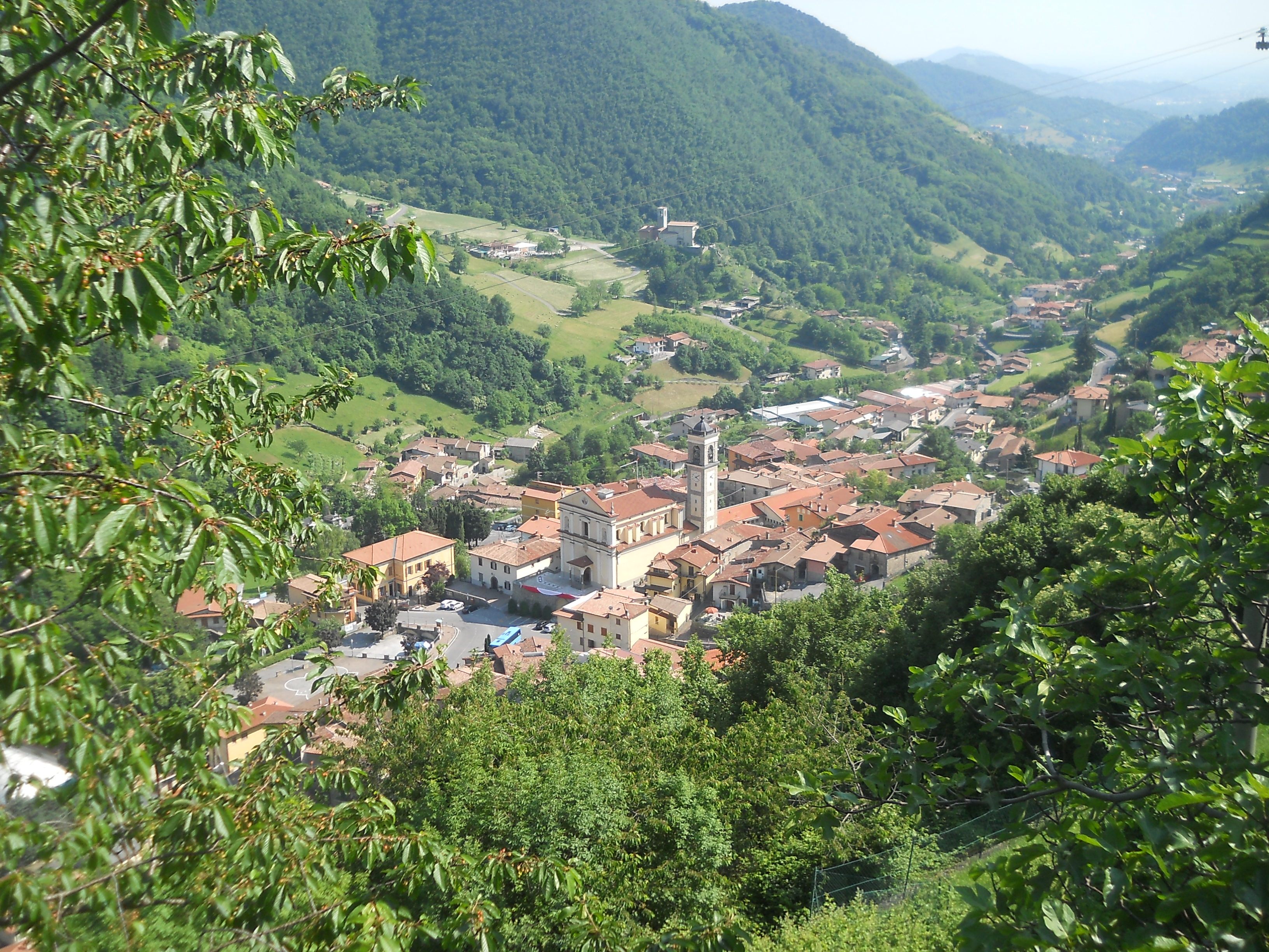 Panorama di Adrara San Rocco